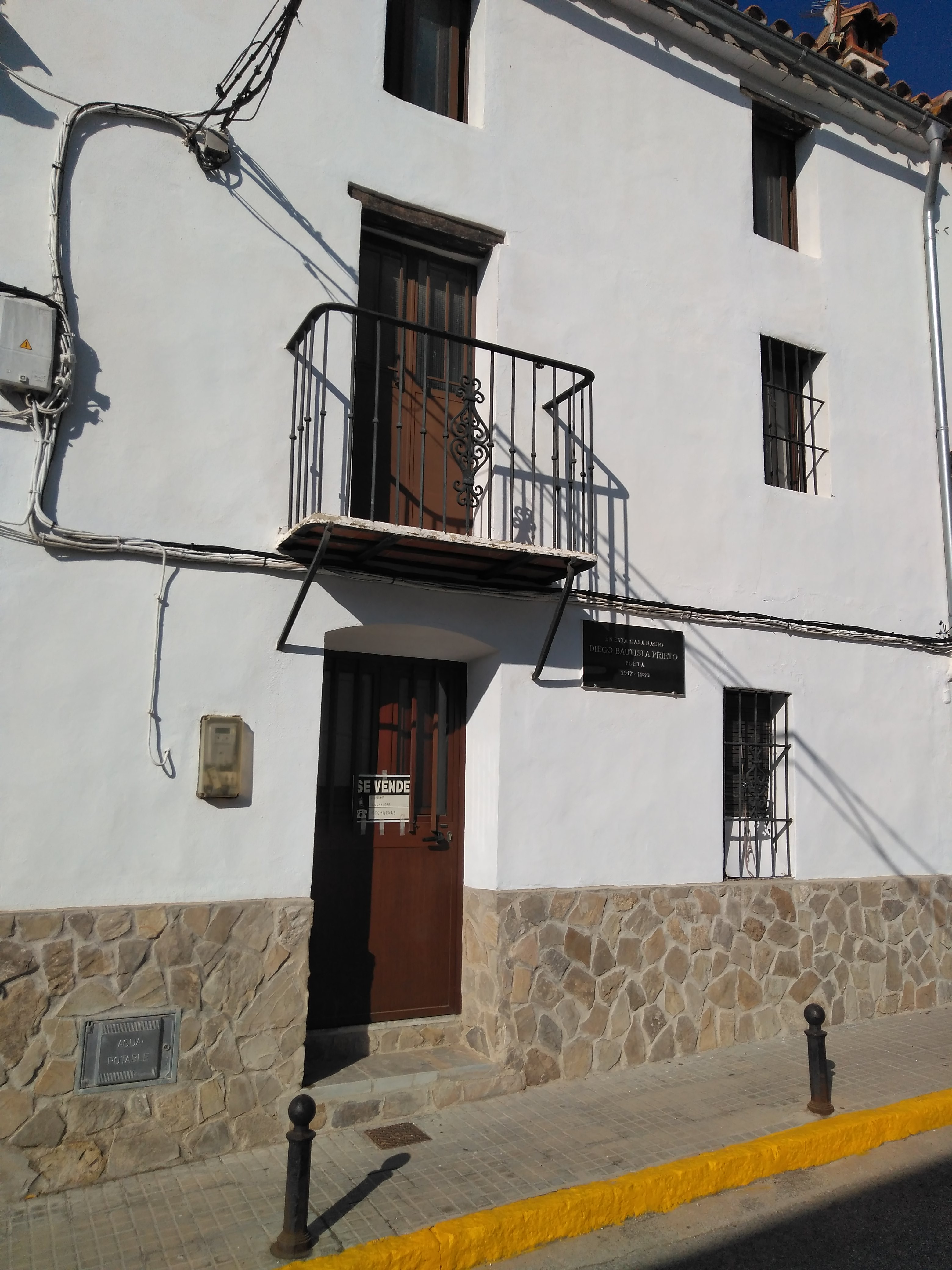 Casa natal del poeta Diego Bautista Prieto en Jimena de la Frontera